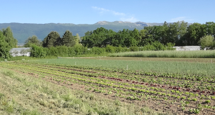 Vue extérieure des Jardins de Cocagne (Genève).